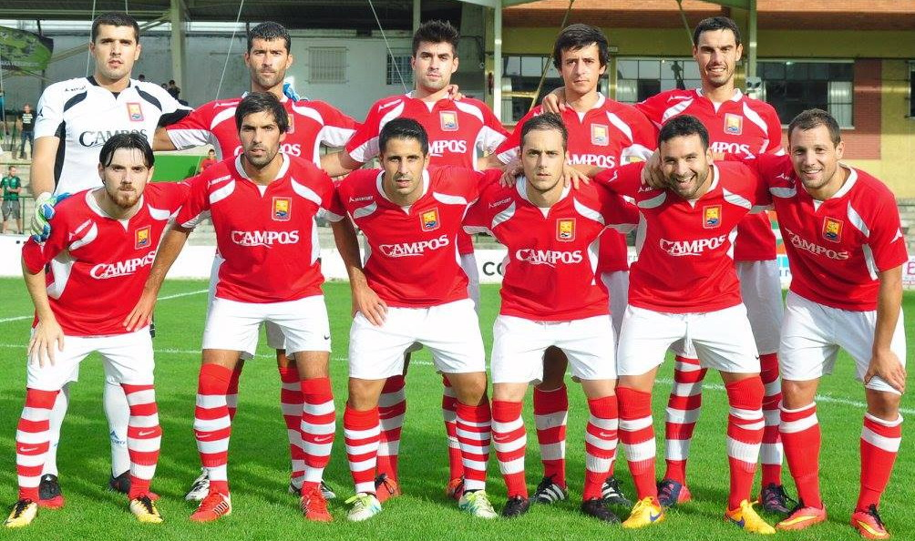 Plantilla Bermeo 2017/2018 17-08-17 en Las LLanas (Sestao)